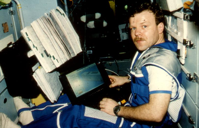 Aus dem Archiv: Mit dem Mehrzonenschmelzofen TITUS (Tubular Furnace with Integrated Thermal Analysis under Space Conditions) wurden in der Schwerelosigkeit Materialproben von verschiedenen Glasarten, Halbleitermetallen und Aluminium-Verbindungen, die unter irdischen Bedingungen nur schwer mischbar sind, prozessiert. Begleitend dazu waren auf dem Crew Laptop - wie im Bild neben Reinhold Ewald zu sehen - Trainings- und Fehlersuchprogramme abrufbar. Computergestützte Prozeduren - bei MIR'97 im Programm enthalten - werden die Papierform ablösen und den Experimentalbelrieb der Internationalen Raumstation optimal unterstützen. Credit: DLR (CC-BY 3.0)